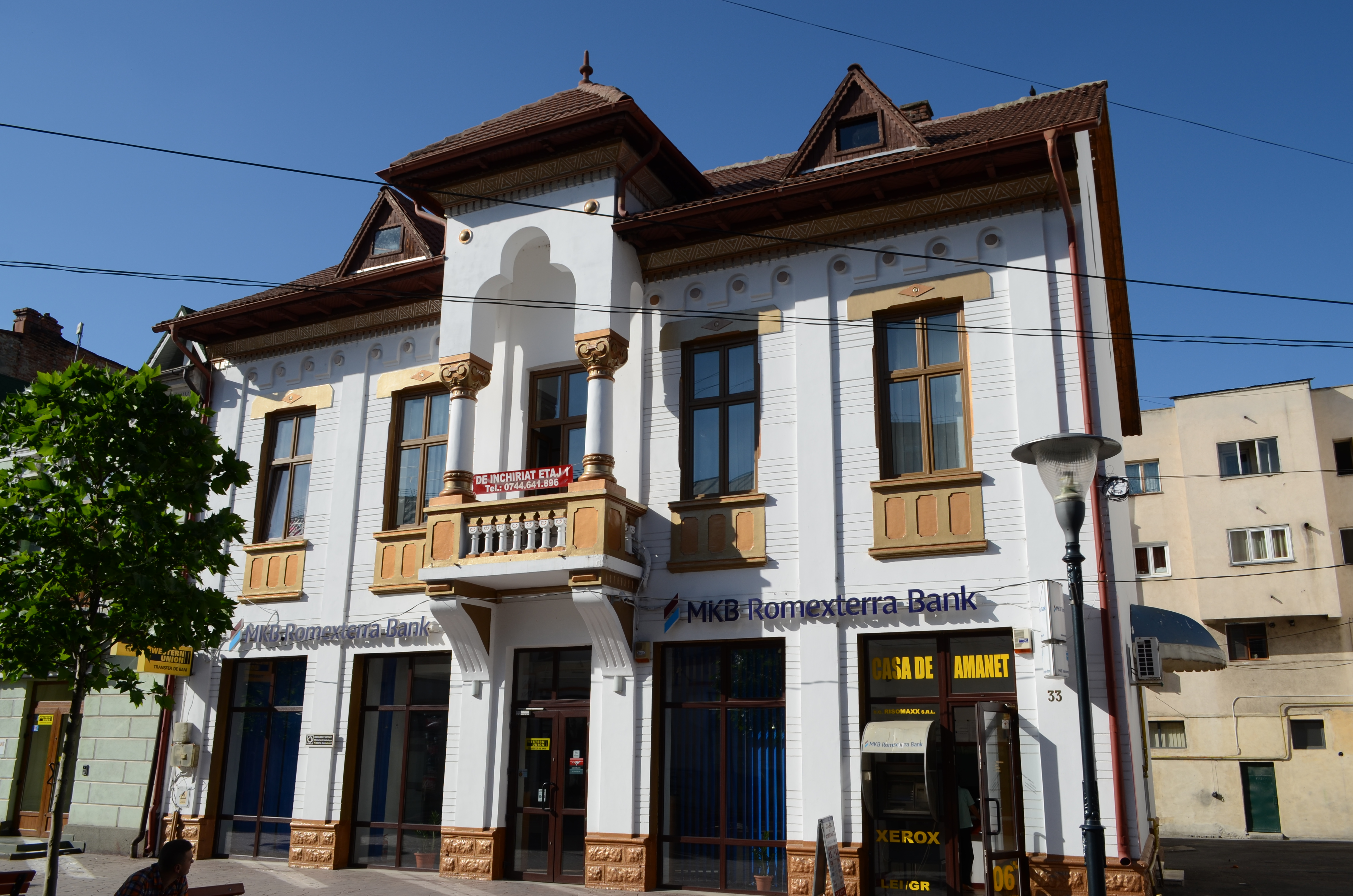 Casă, Str. Tudor Vladimirescu nr. 33, Târgu Jiu (sediul MKB Romexterra Bank)